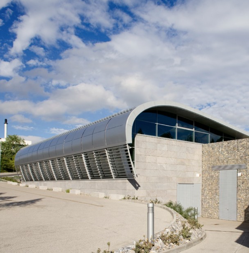 Max-Planck-Institut für Dynamik und Selbstorganisation, Experimentierhalle 2003. Foto: Schwieger Architekten.